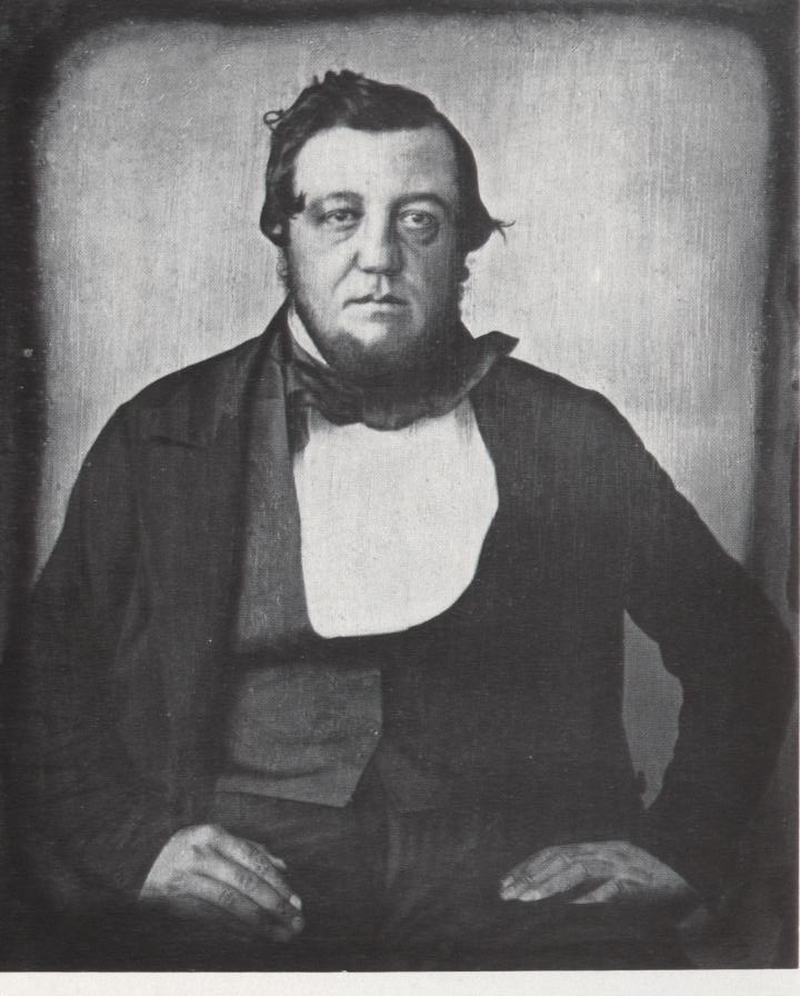 Georg Adam Kühnle, Industrieller und Firmengründer in Frankenthal (Pfalz)